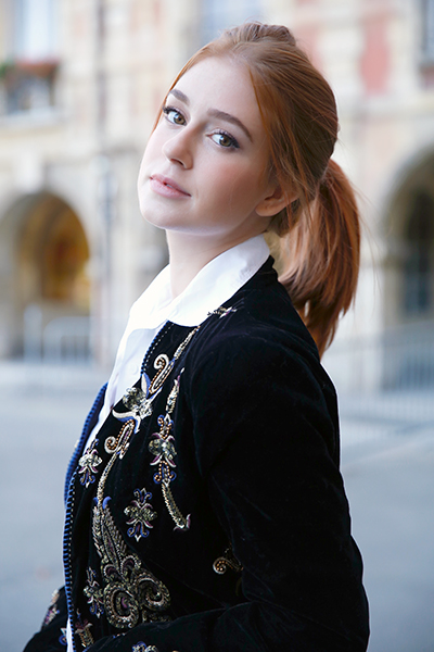 Marina